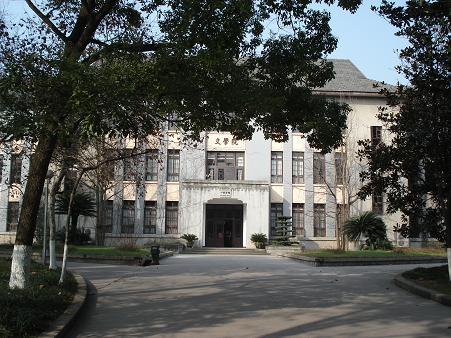 西南大學文學院，建於五十年代初，西南師範學院1950年搬迁到北碚，1952年就在当时援华苏联专家的帮助下设计了這棟樓，大楼竣工投入使用是1952年。至今已有55年历史。整个大楼主楼为3层，东西两头的裙楼只有两层。 1953年大楼修建好投入使用后，是当时西南师范学院建好的第一栋教学楼，而“第一教学楼”的名字一直从那时沿用到今天。“当年国学大师吴宓作为中文系的教授，在这里为学生授课一直持续到1978年左右。现在文学院的名字就是吴宓当年题写的。 2008年8月1日發生火災，該樓不幸被燒毀。